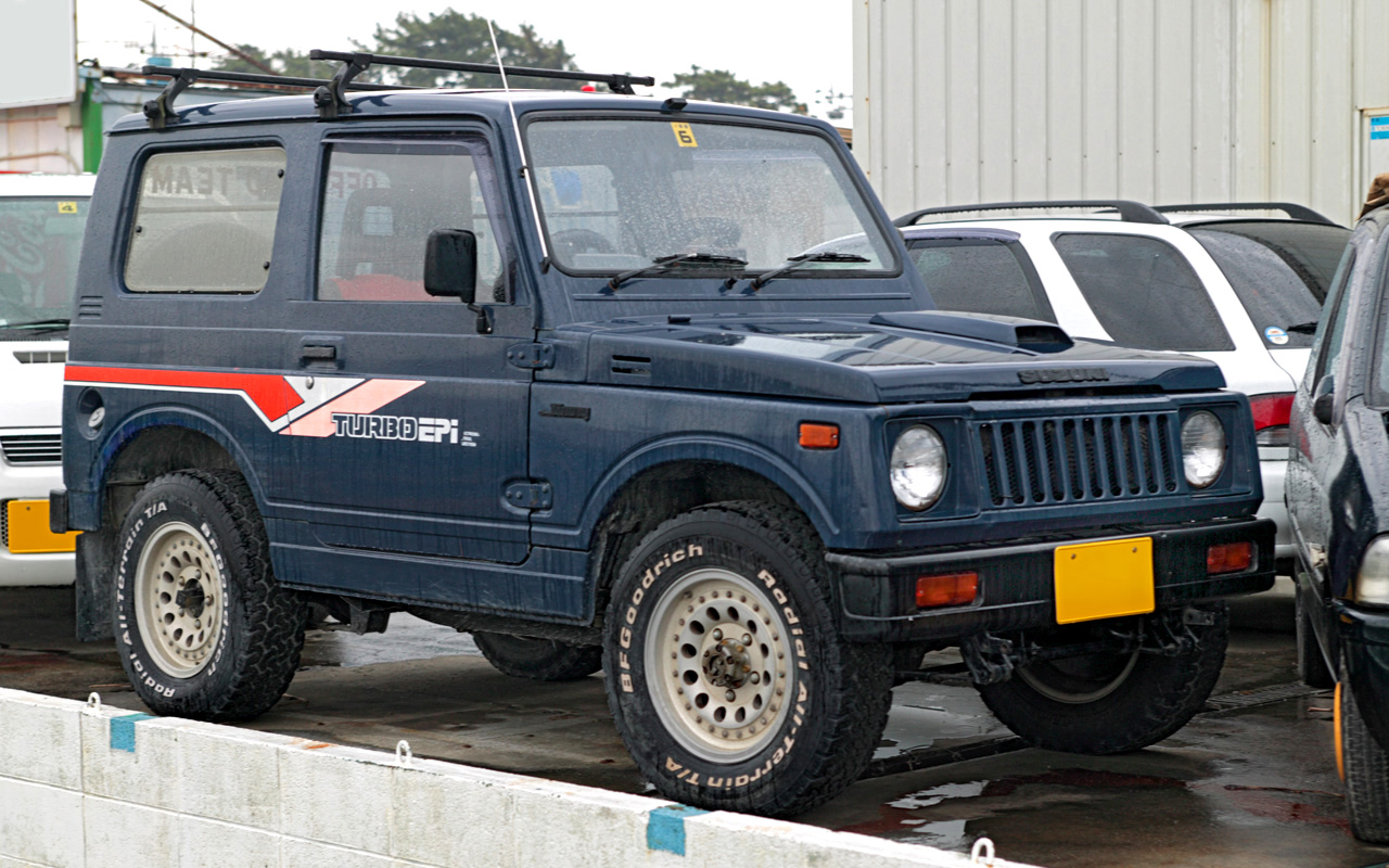 Suzuki Jimny Turbo Van HC ( JA71V )